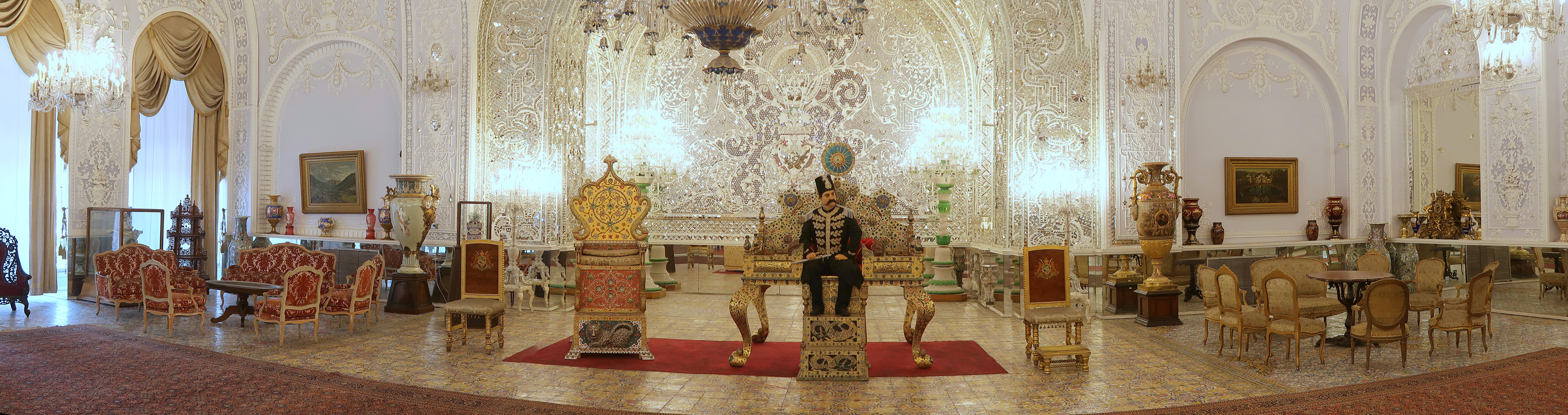 تالار سلام کاح گلستان